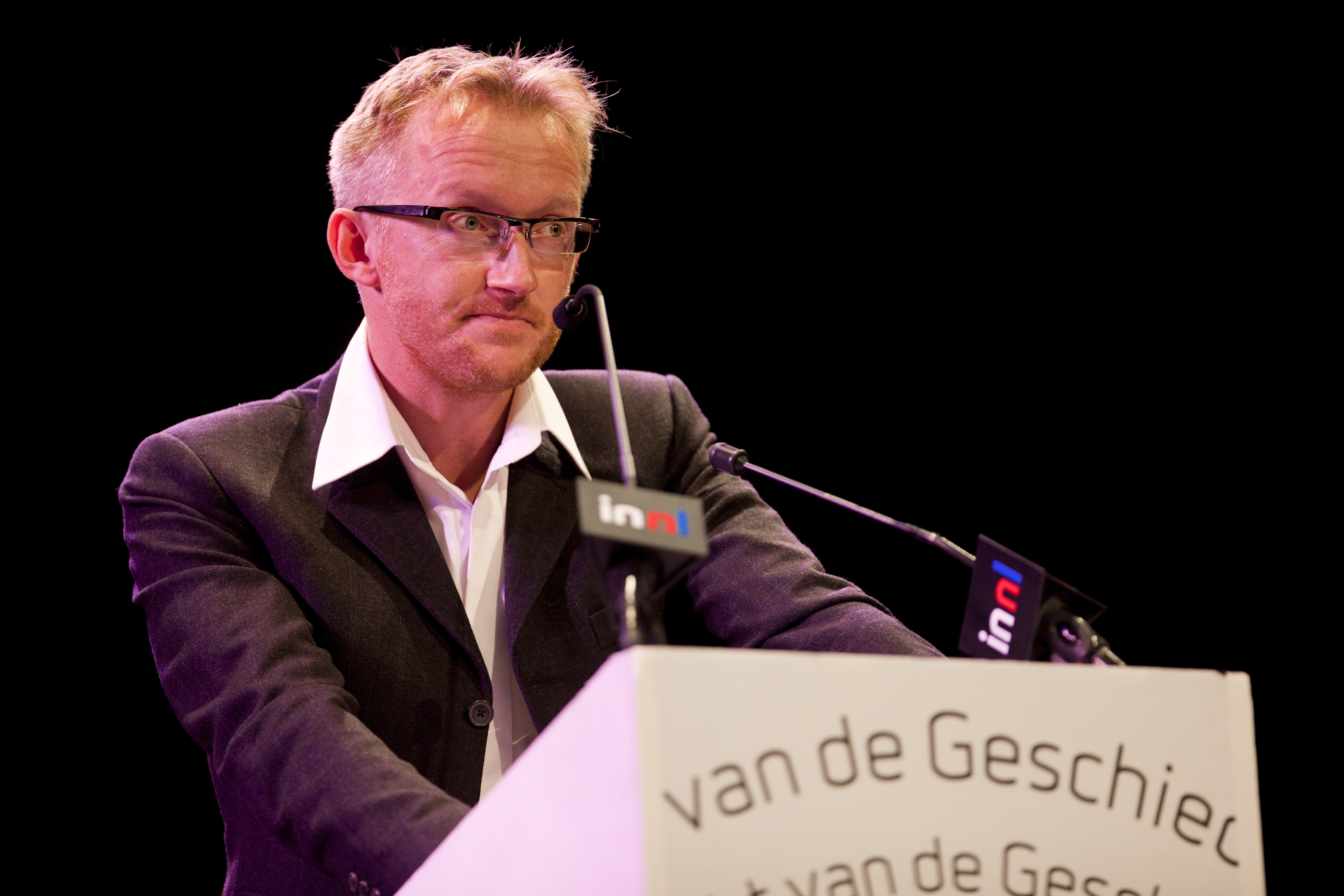 Zaterdag 23 oktober 2010 vond de Nacht van de Geschiedenis plaats in de Amsterdamse Stadsschouwburg. De Nacht is de feestelijke afsluiting van de Week van de Geschiedenis. Ontdek meer op Foto: Fred Ernst